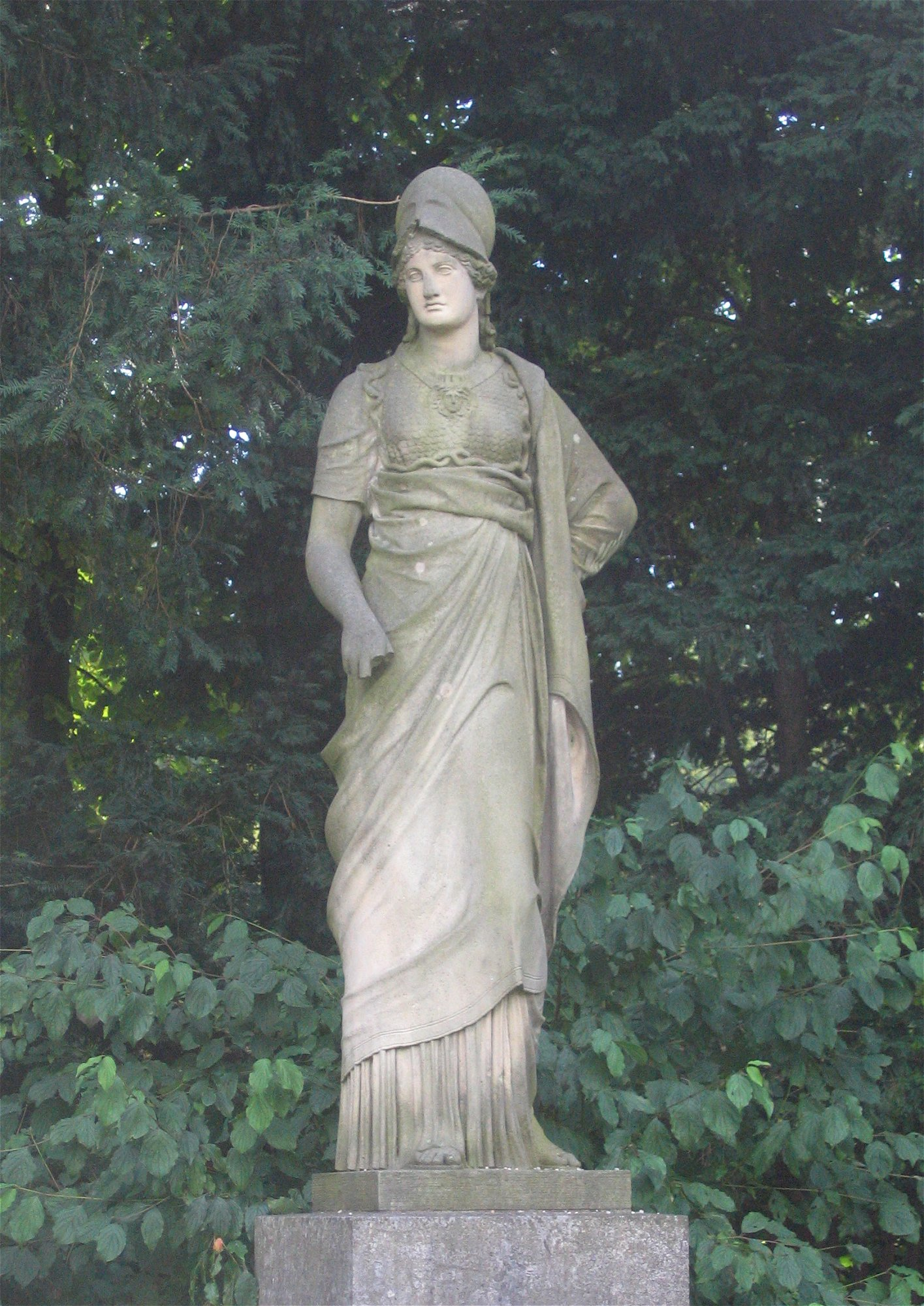 Schlosspark Nymphenburg, Statue der Minerva, von Landolin Ohmacht (1804-07)